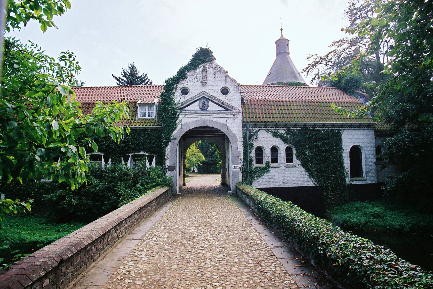 De voorburcht annex poortgebouw van kasteel Aldeghoor te Haelen.